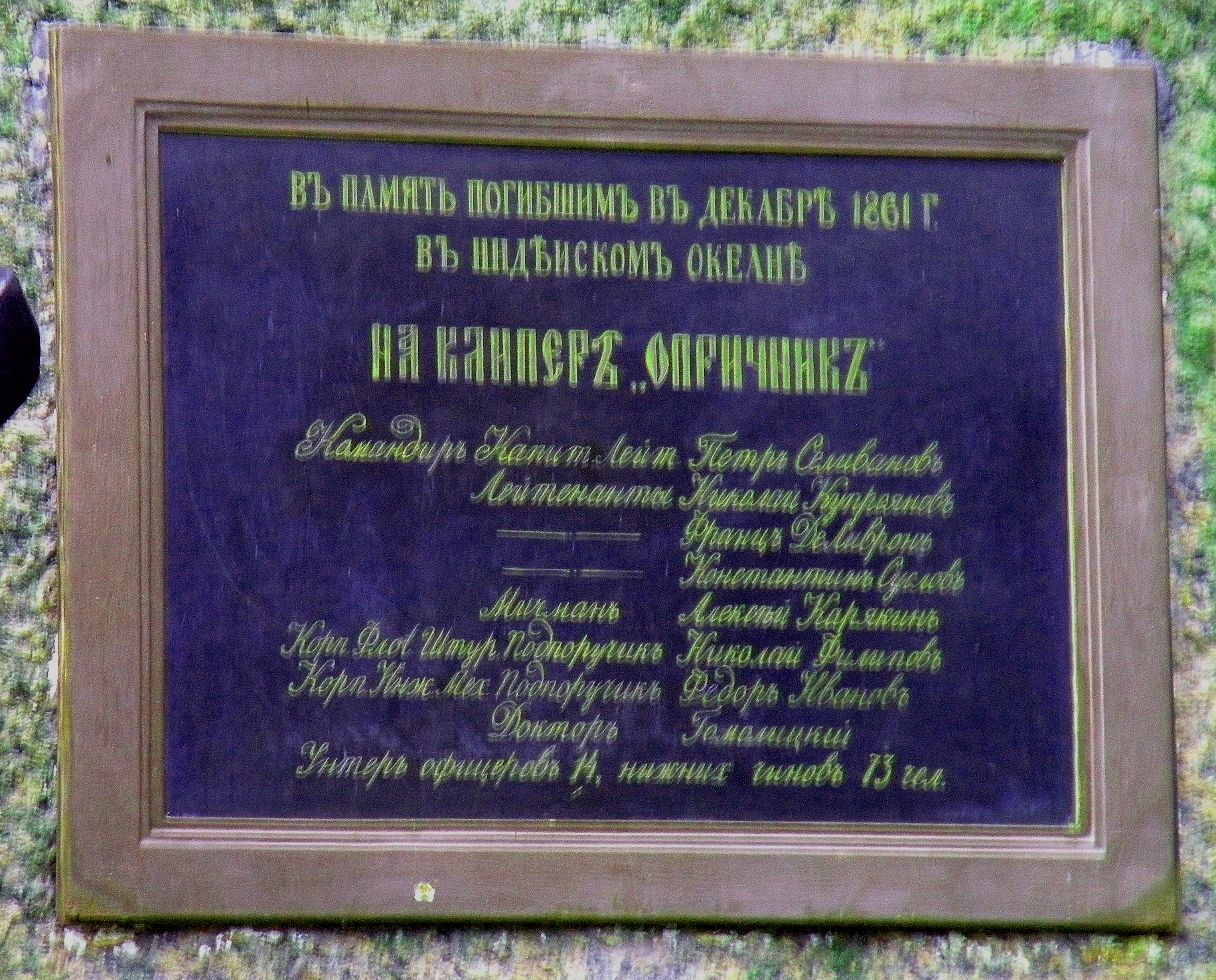 Кронштадт.Памятная доска экипажу "Опричника".